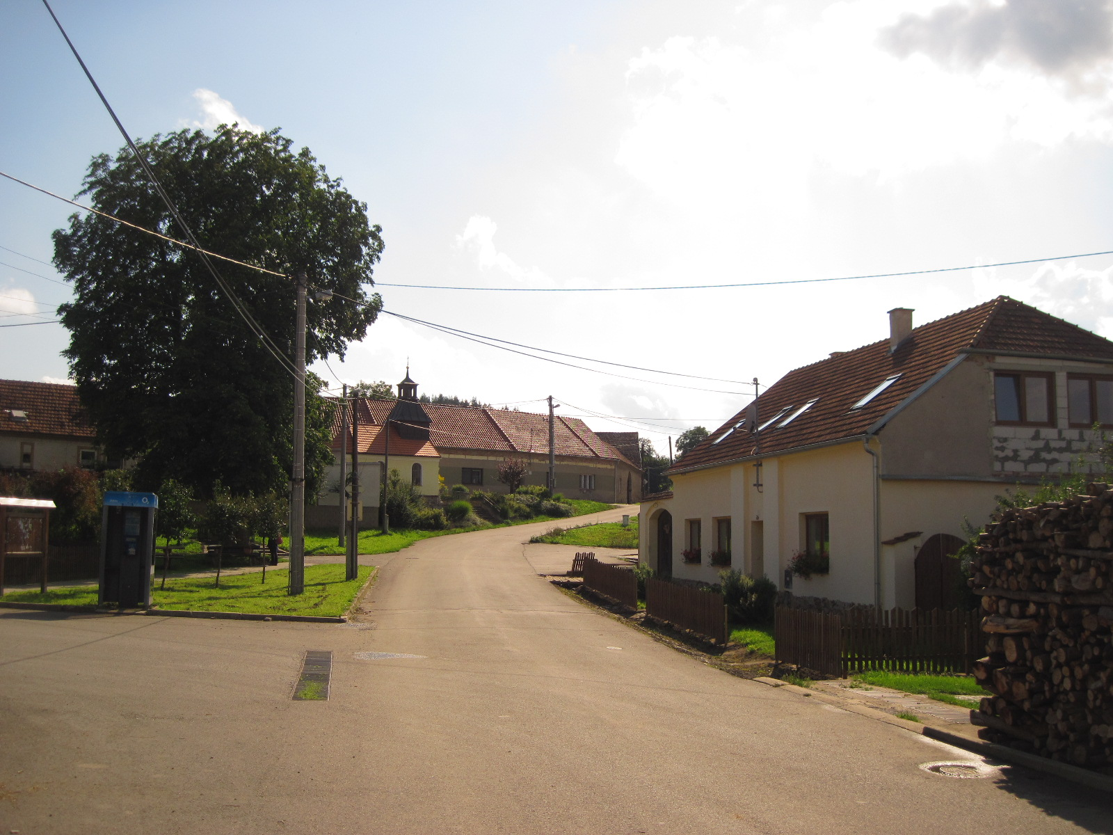 Heroltice u Tišnova - náves